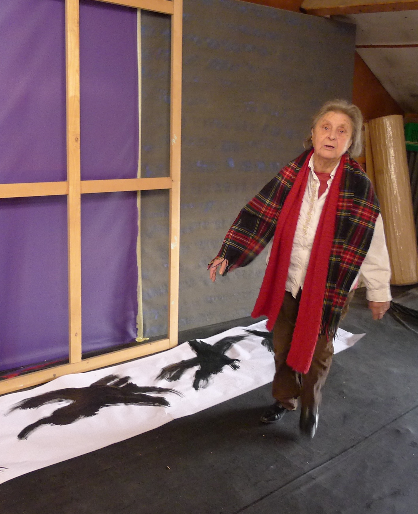 Judit Reigl dans son atelier de Marcoussis février 2012